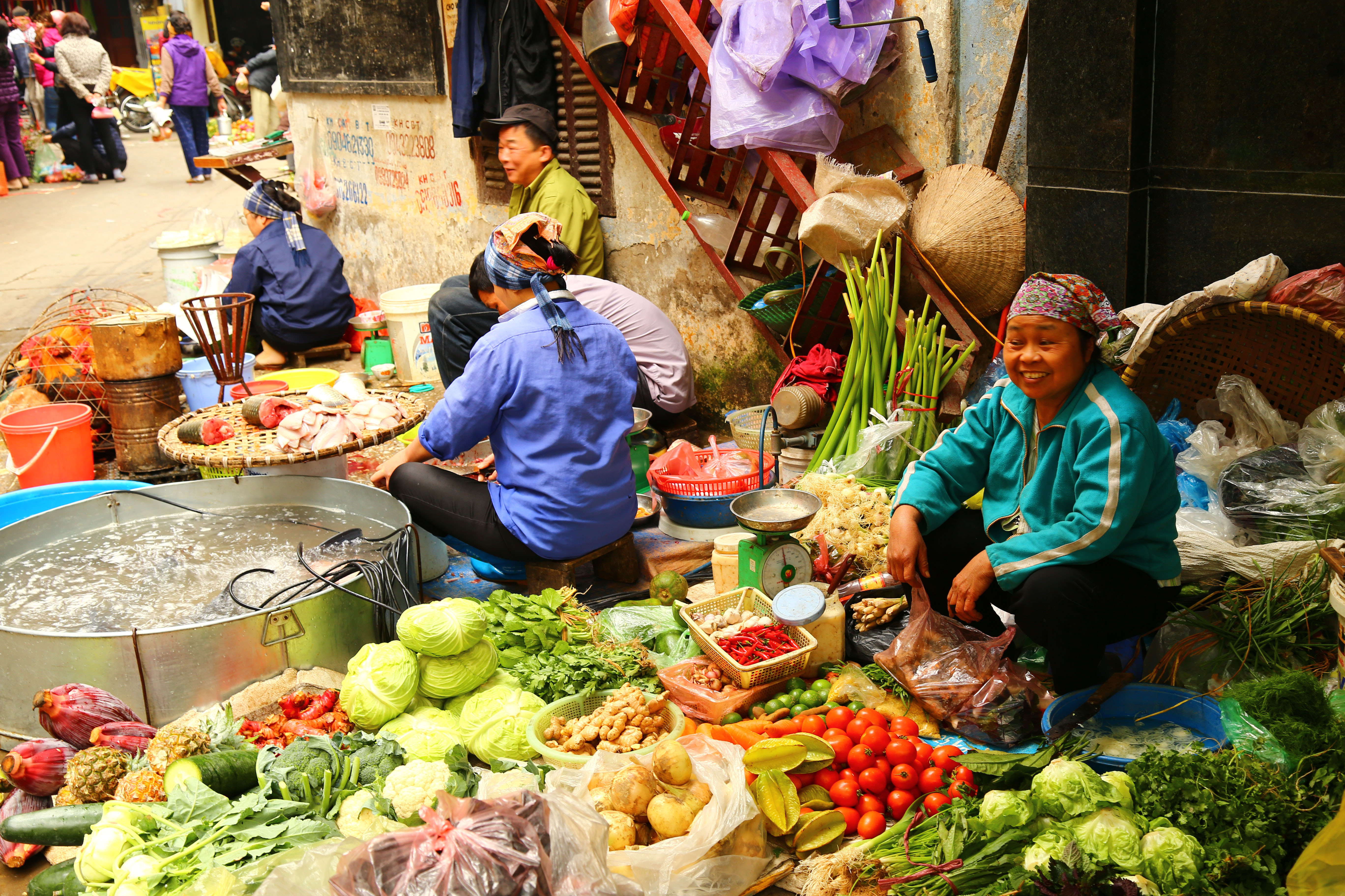 Un marché local à Hanoï